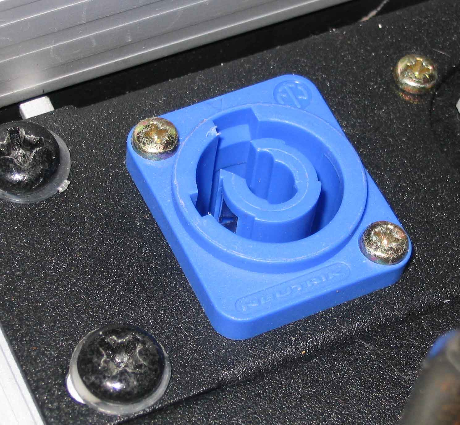 PowerCon Buchse und spannungsempfangend, daher blau. Wackernheim, den 25.08.2005